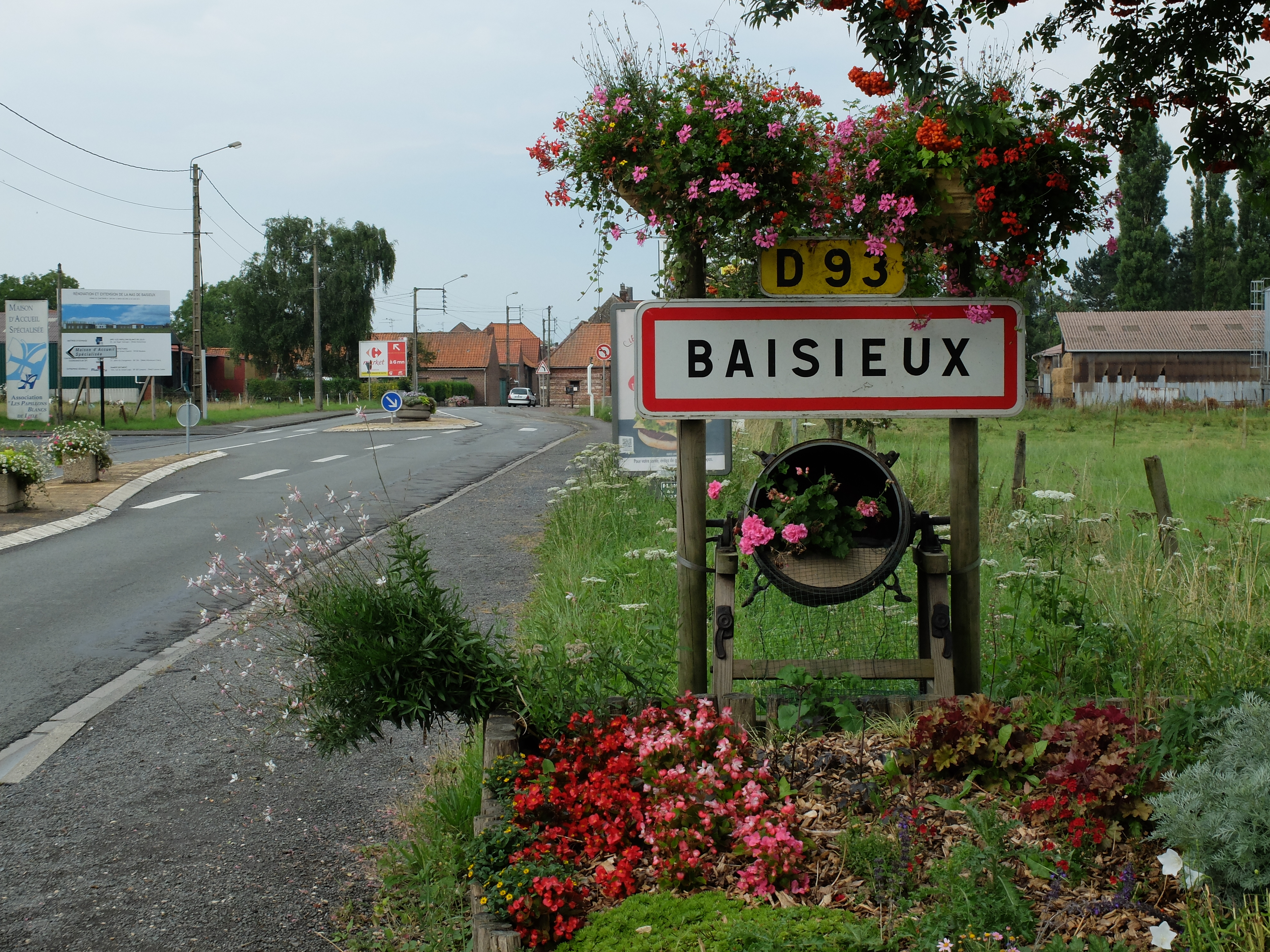 Vue d'une entrée de la commune de Baisieux (Nord).